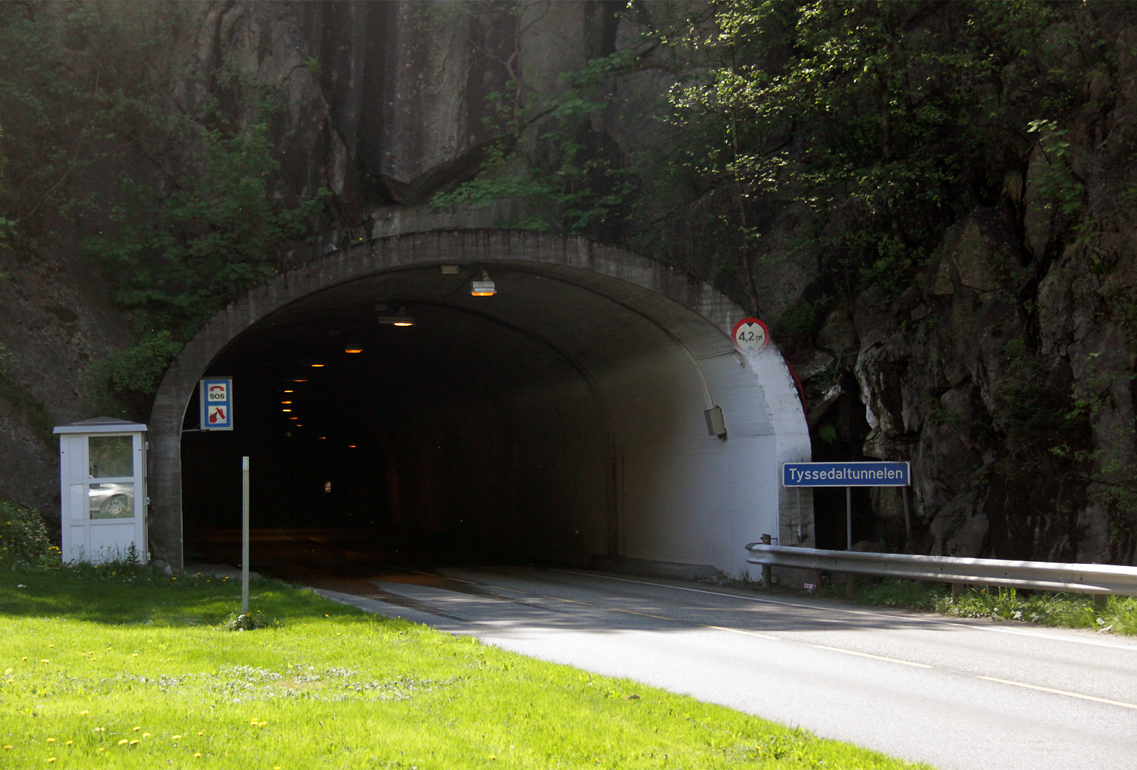 Tunnel på riksvei 13 i Hordaland